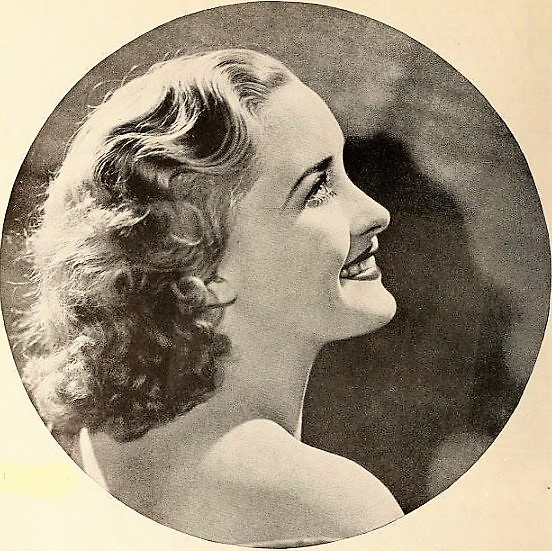 Marian Marsh